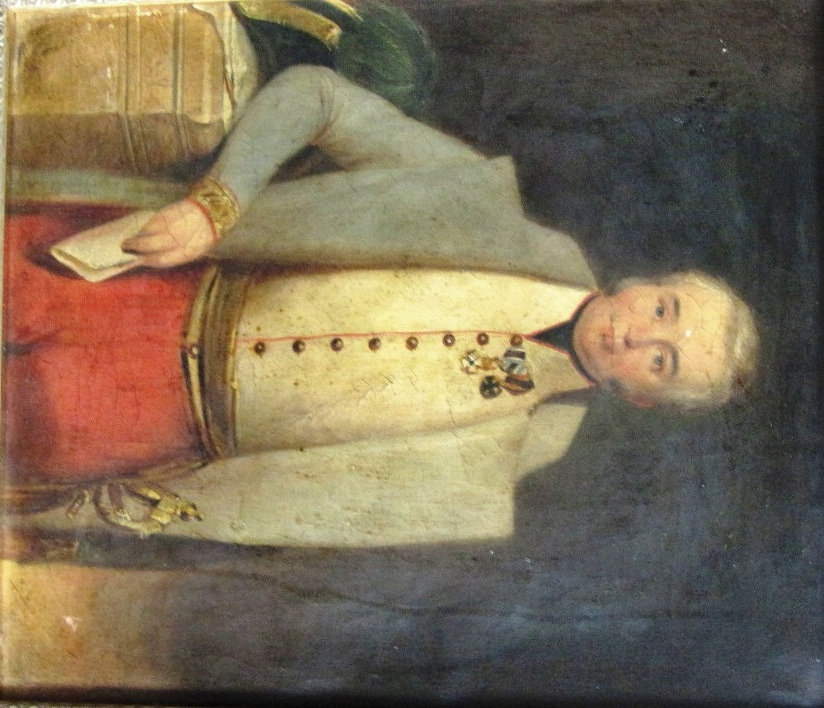 Conrad von Mederer (1781-1840), österreichischer Generalmajor, bayerischer Max-Joseph-Ritter